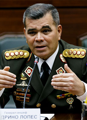 Министр обороны Боливарианской Республики Венесуэла генерал-аншеф Владимир Падрино Лопес во время встречи с Министром обороны Российской Федерации генералом армии Сергеем Шойгу